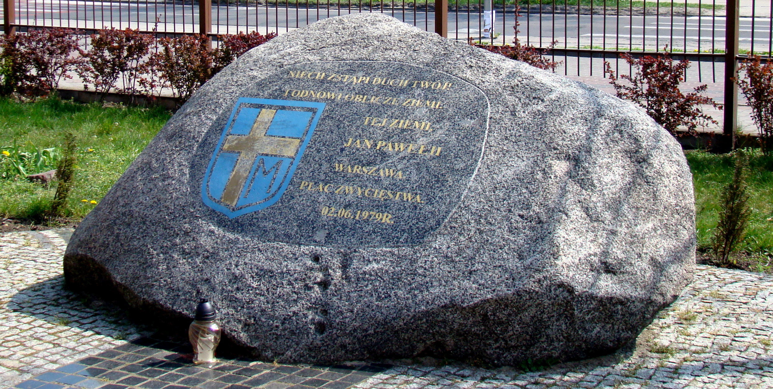 Kościół pw. św Kazimierza Królewicza w Policach (pamiątkowy głaz), Polska